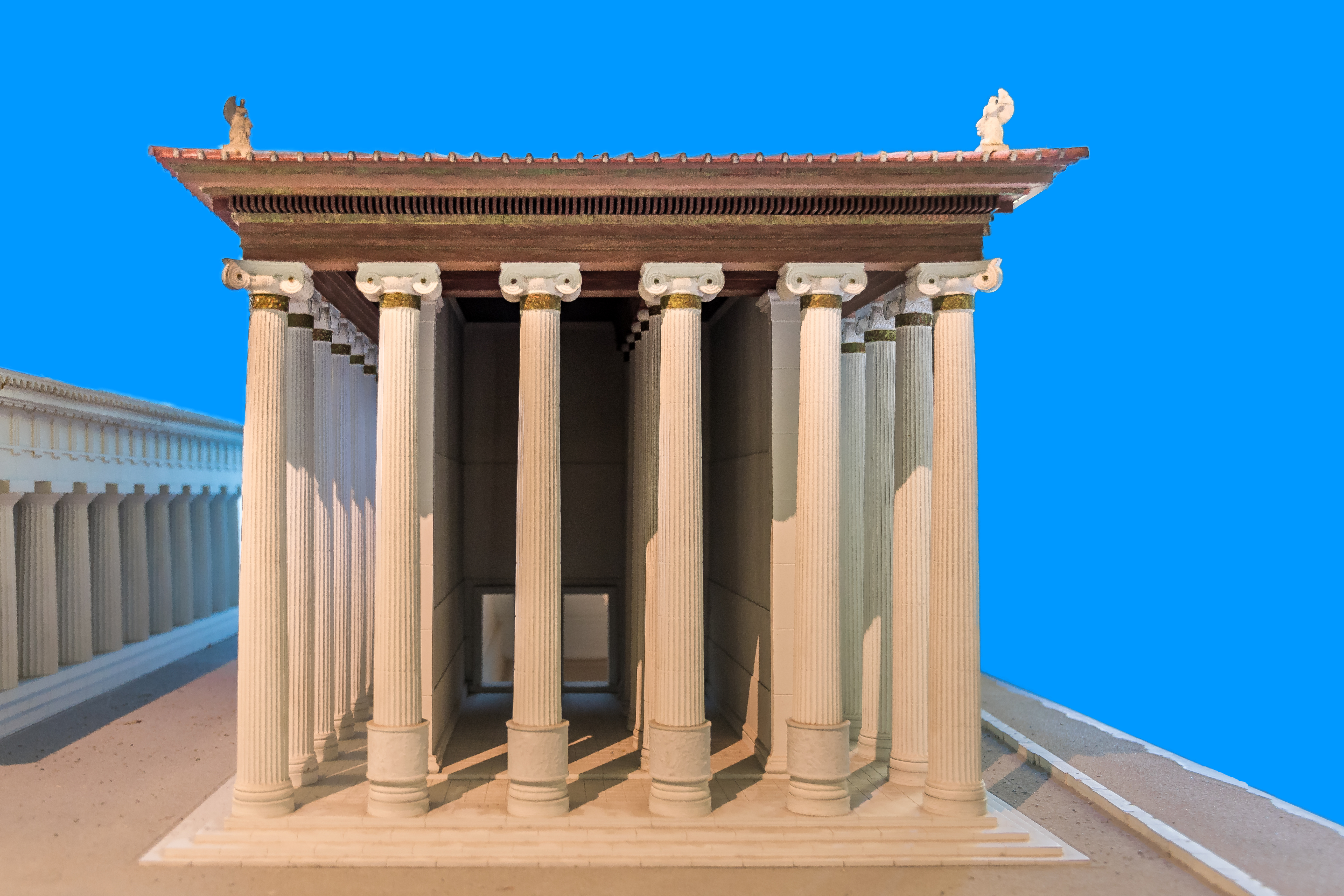 Modellrekonstruktion vom Artemistempel (Syrakus) im Museo Paolo Orsi